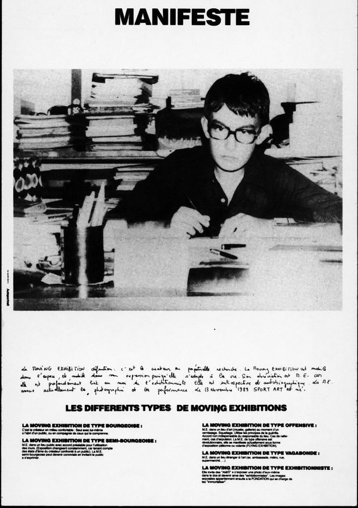 Tagalog: Thierry G young